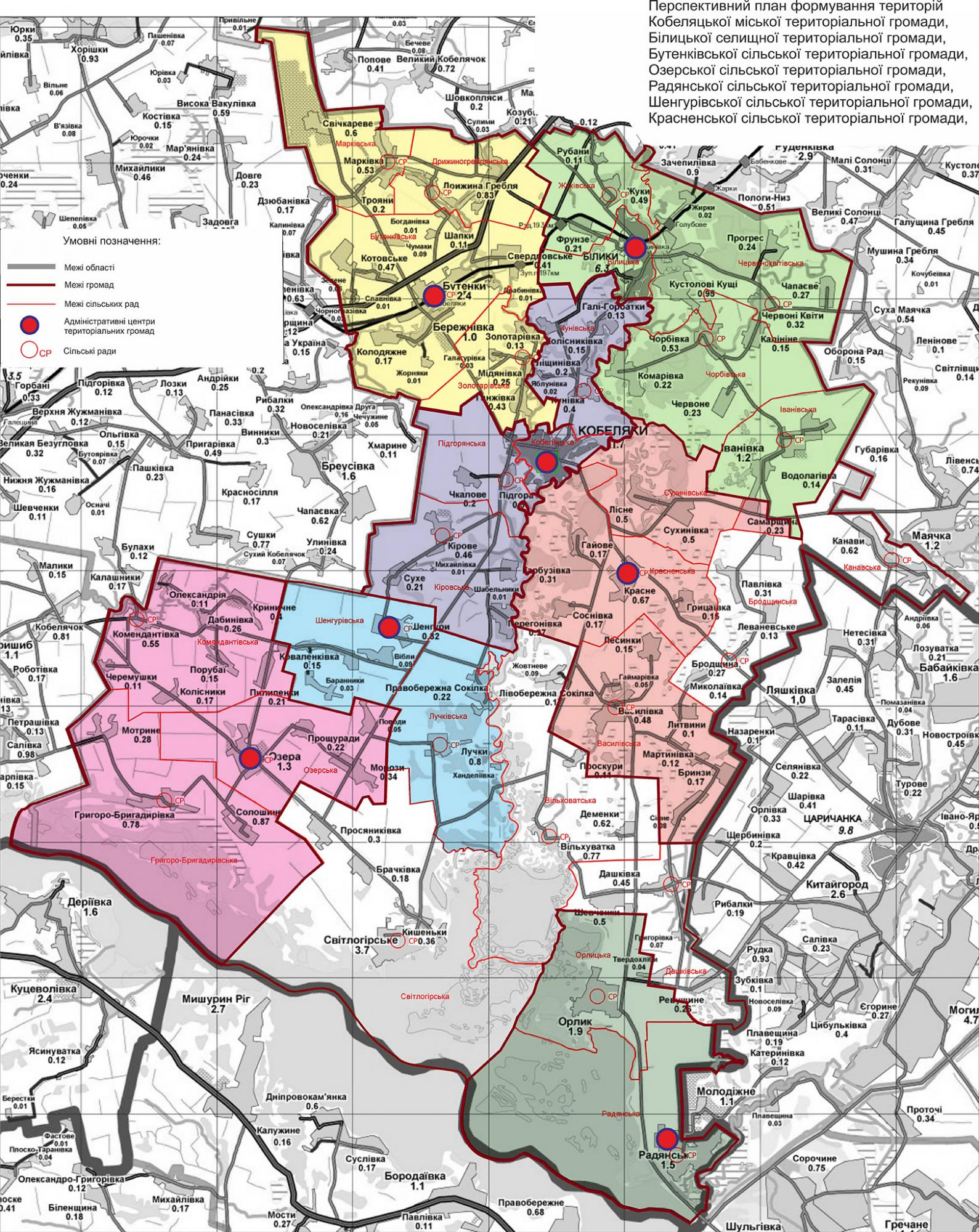 Перспективний план формування територій Кобеляцької міської територіальної громади, інших громад на території Кобеляцького району.